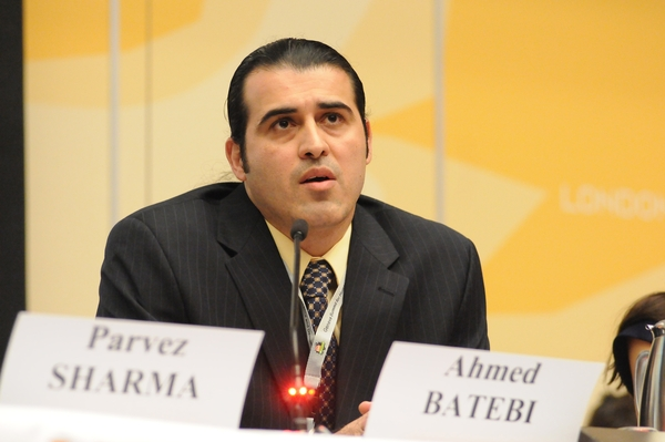 احمد باطبی 2009 ، ژنو ، سوئیس ، سخنرانی در مقر سازمان ملل متحد در خصوص وضعیت حقوق بشر ایران